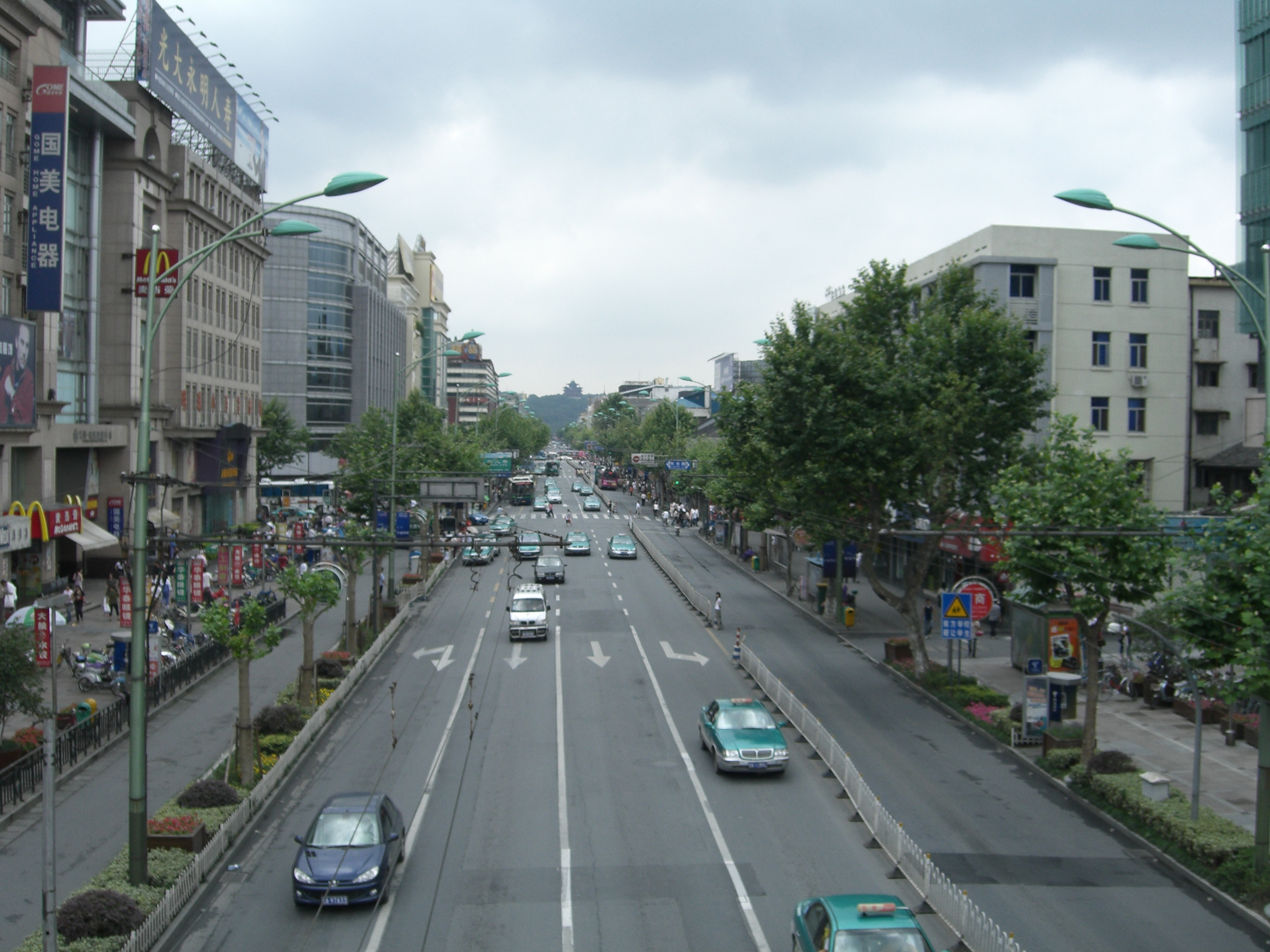 Yan'an Road (延安路), Hangzhou